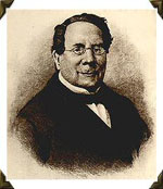 retrato de Mesonero Romanos